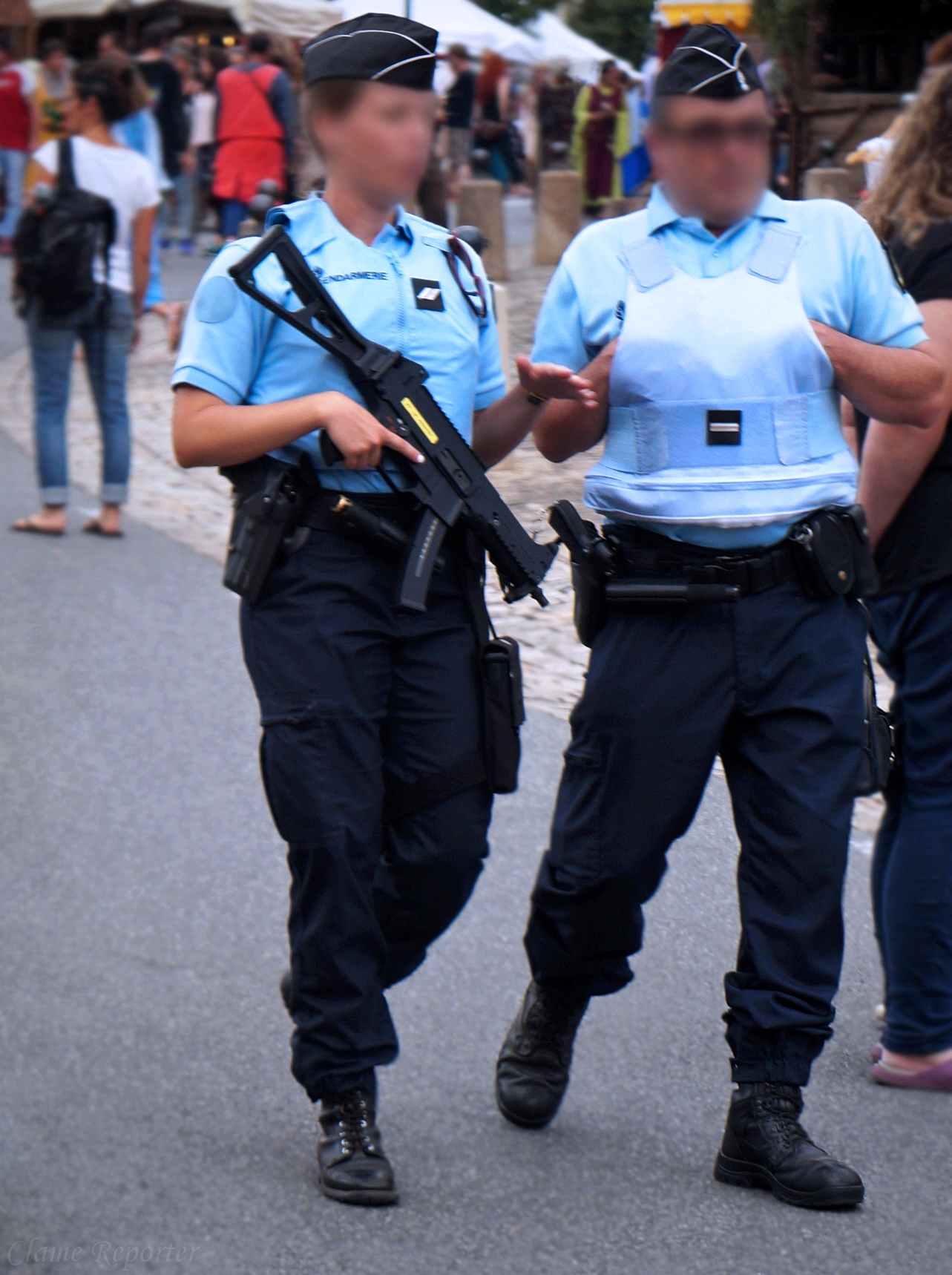 Dans un contexte d'état d'urgence et de menace terroriste, les festivités estivales de 2016 ont été placées sous haute surveillance partout en France, aussi bien à Paris qu'en province. La gendarmerie a déployé un dispositif de présence très visible avec des forces de l'ordre ostensiblement armées.